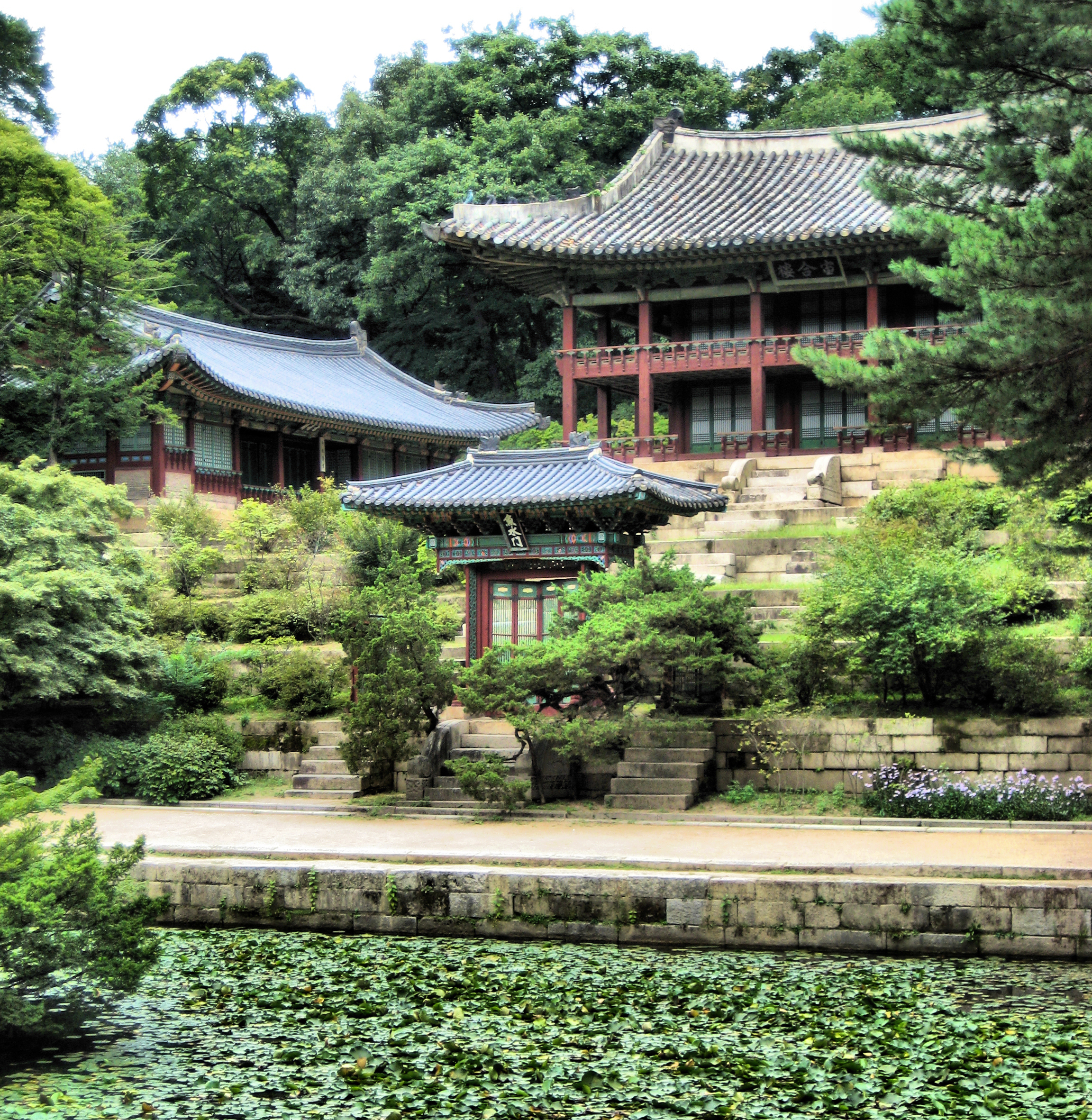 Changdeokgung Garden Pavillion